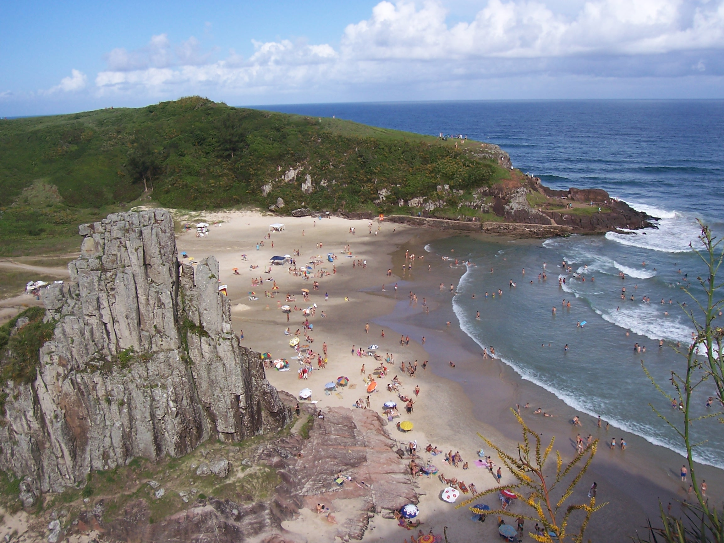 Praia da Guarita en Torres, Rio Grande do Sul, Brasil.